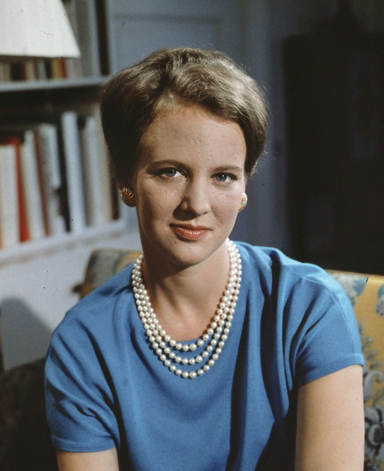 troonopvolgster prinses Margrethe